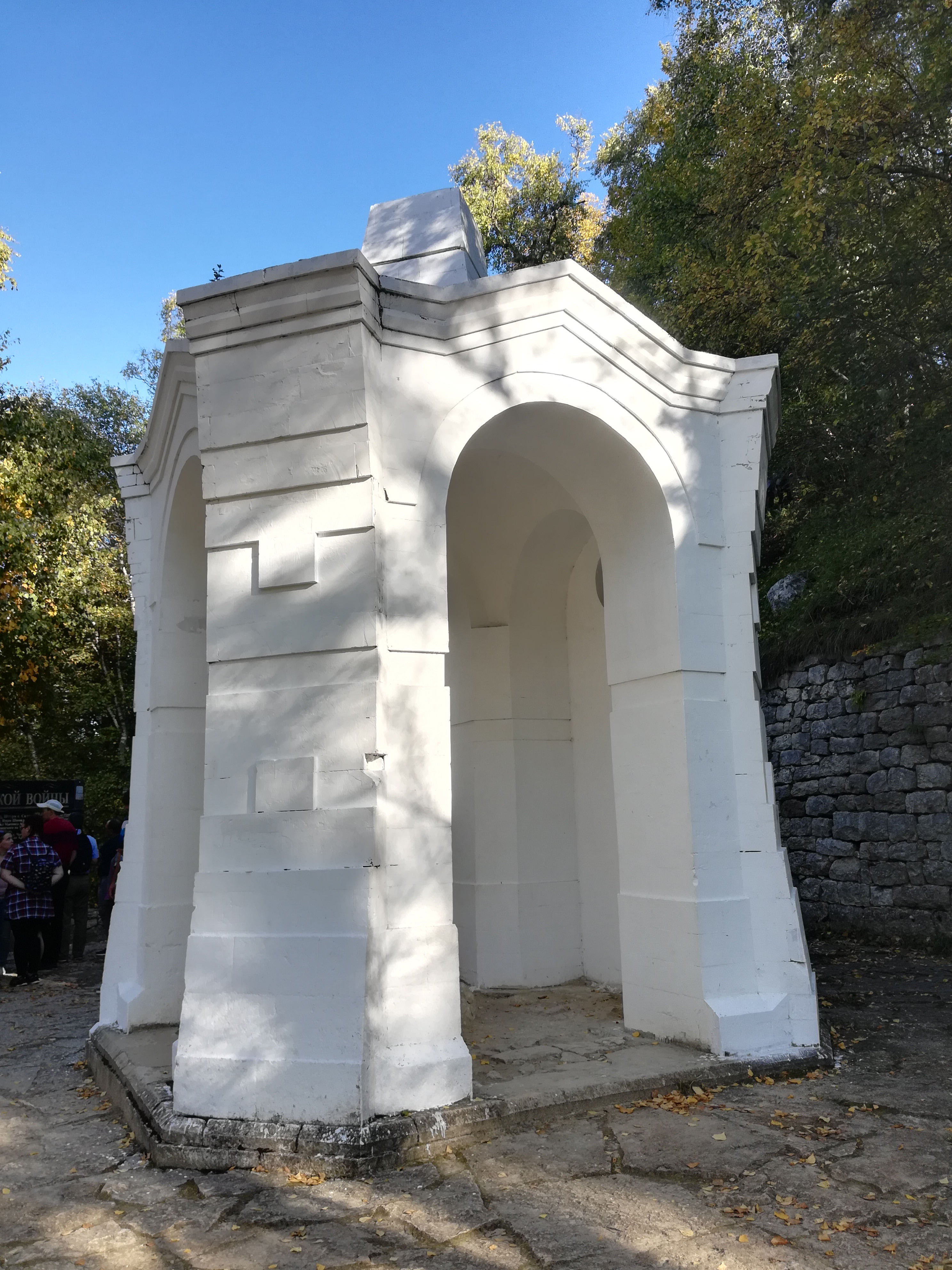 Дагестан